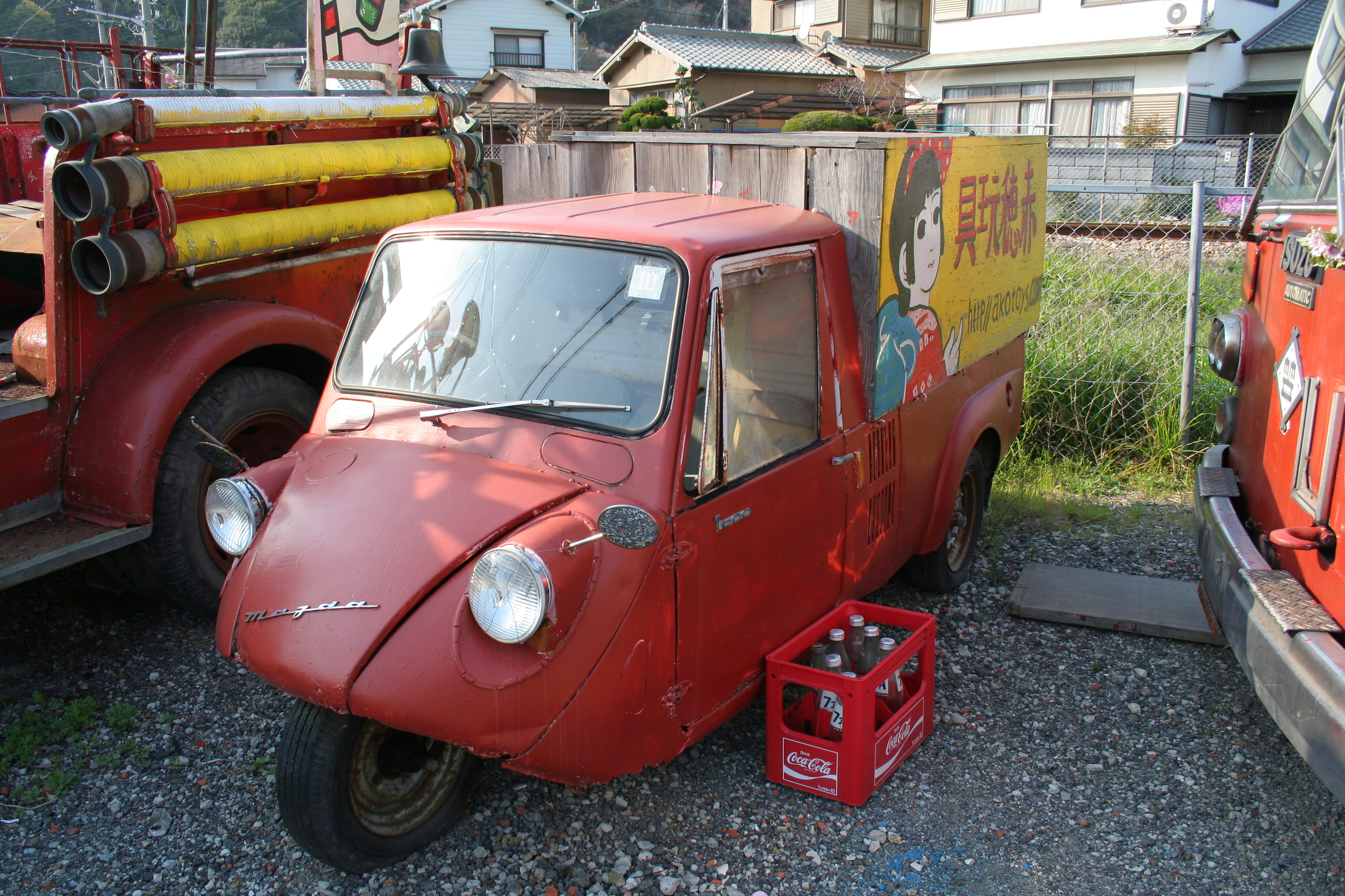 マツダのT600。